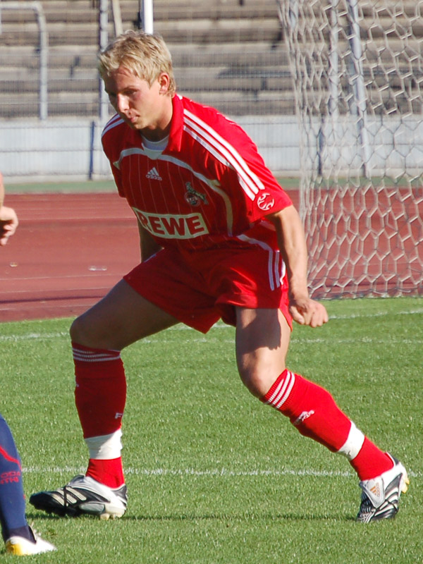 Kevin Schöneberg